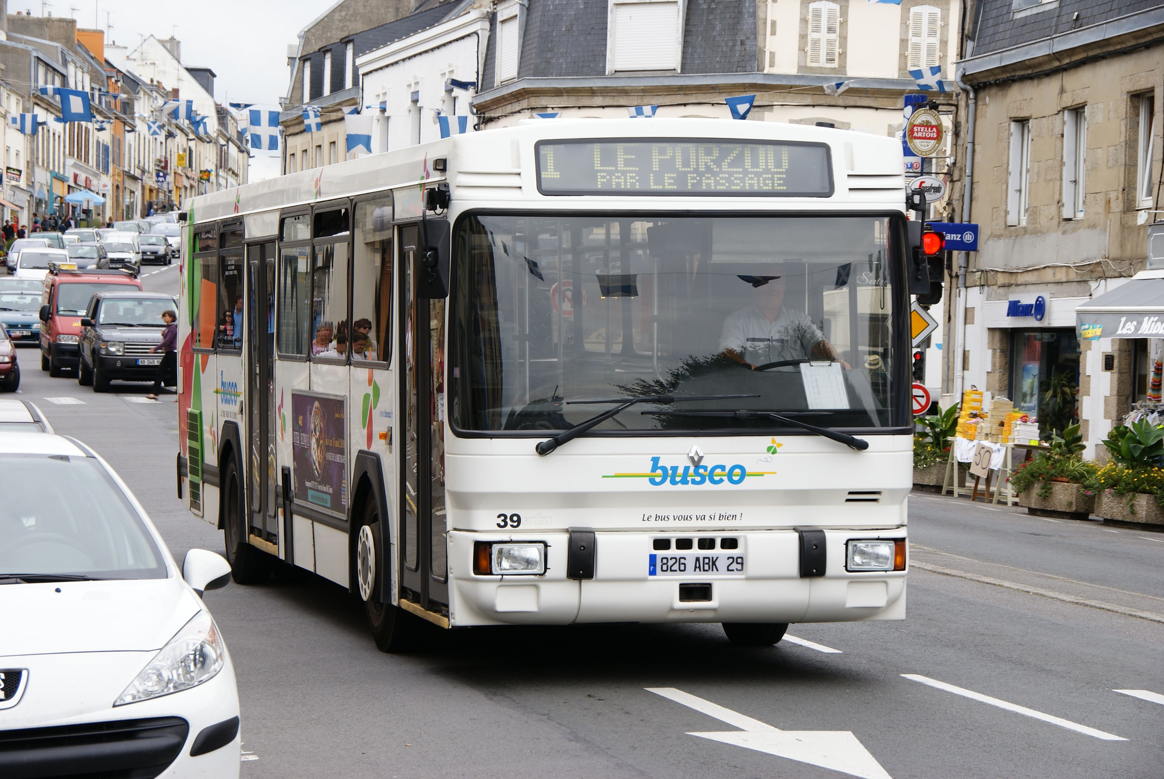 PR 112 du réseau Busco, numéro de parc 39